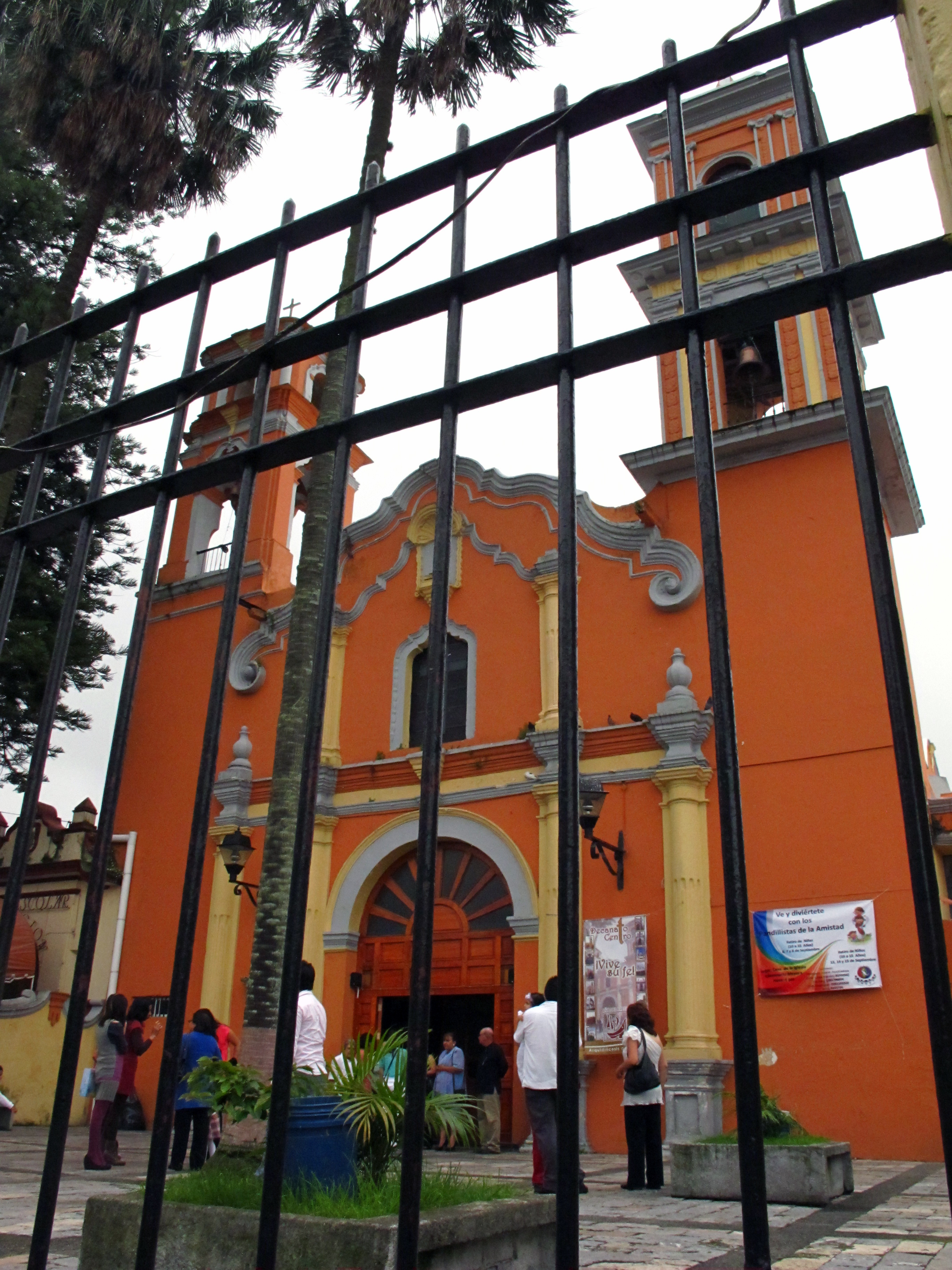 Capilla de los Corazones